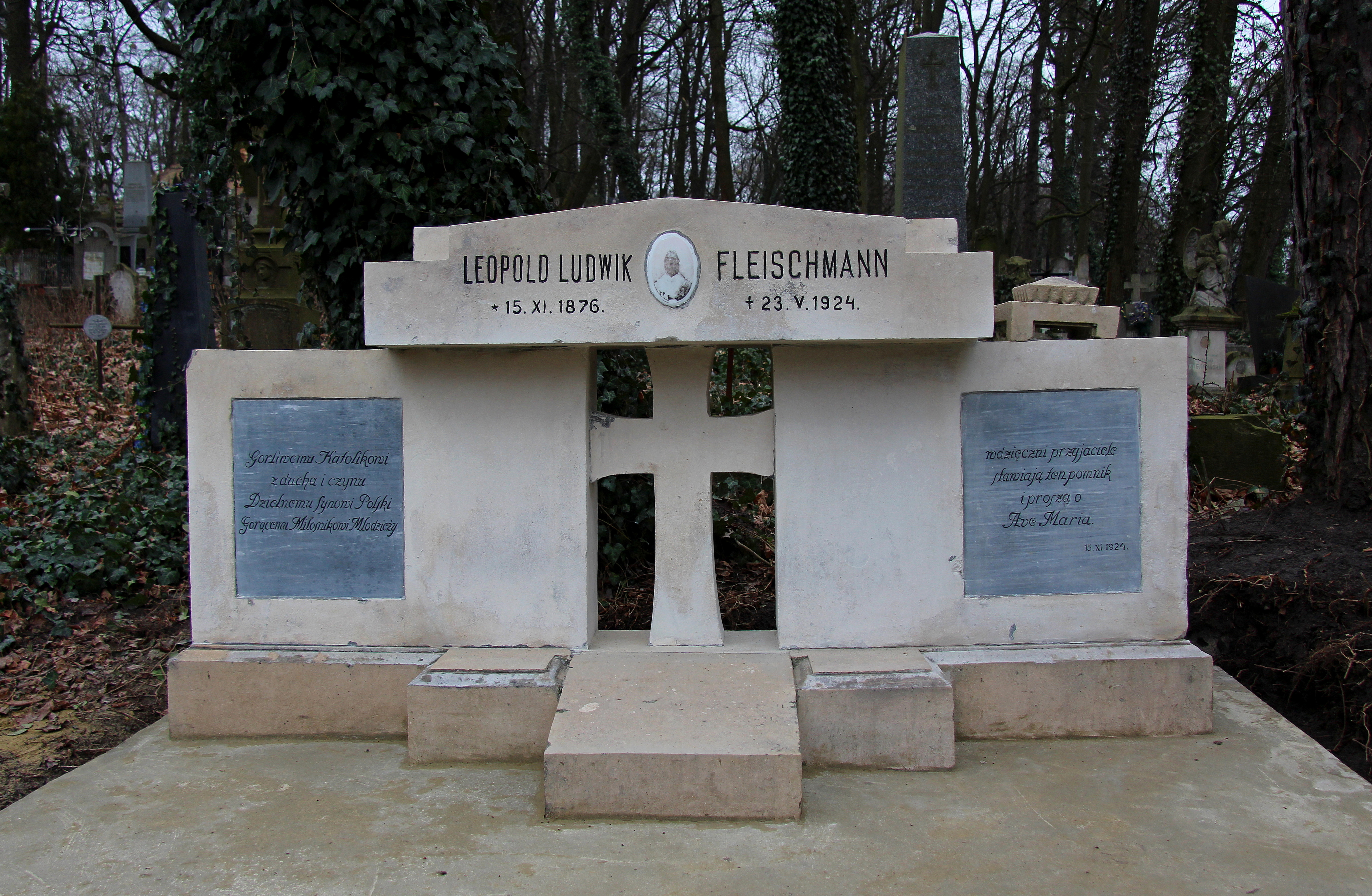 Пам'ятник на могилі Л.Флейшмана.Личаківський цвинтар ,поле № 19.